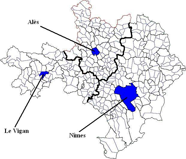 Les 3 arrondissements du Gard